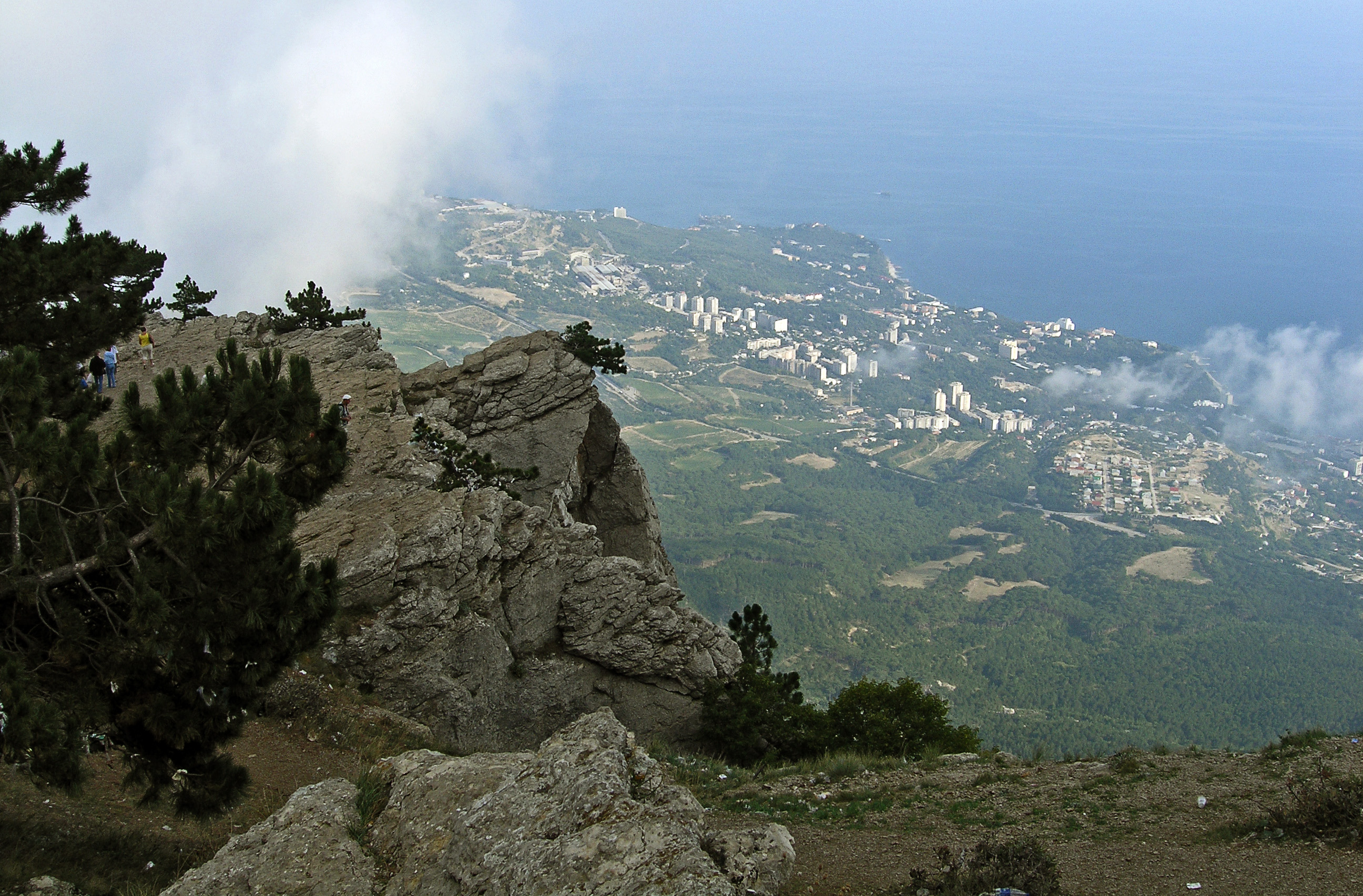 Вид с Ай-Петри